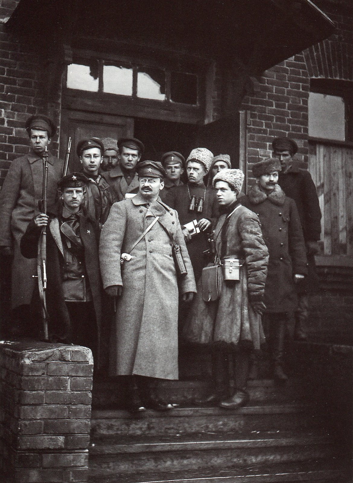 Лев Троцкий с красноармейцами на станции Лиски